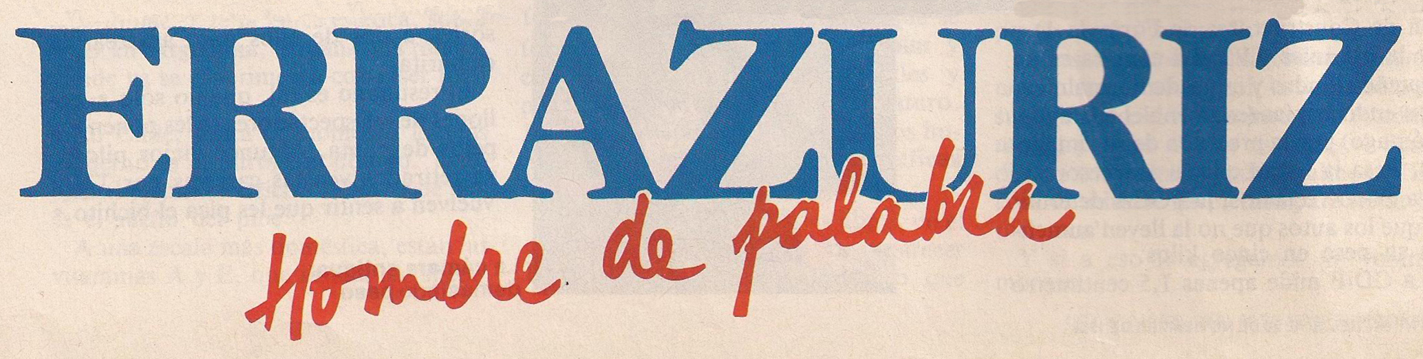 Afiche de Campaña de Francisco Javier Errazuriz, durante la elección presidencial de 1989.